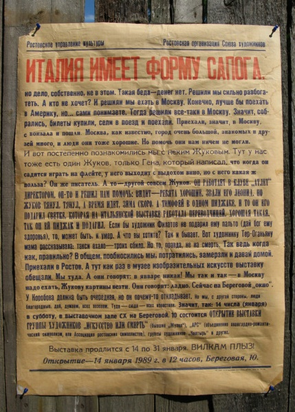 Афиша выставки "Италия имеет форму сапога". Ростов-на-Дону, 1989.